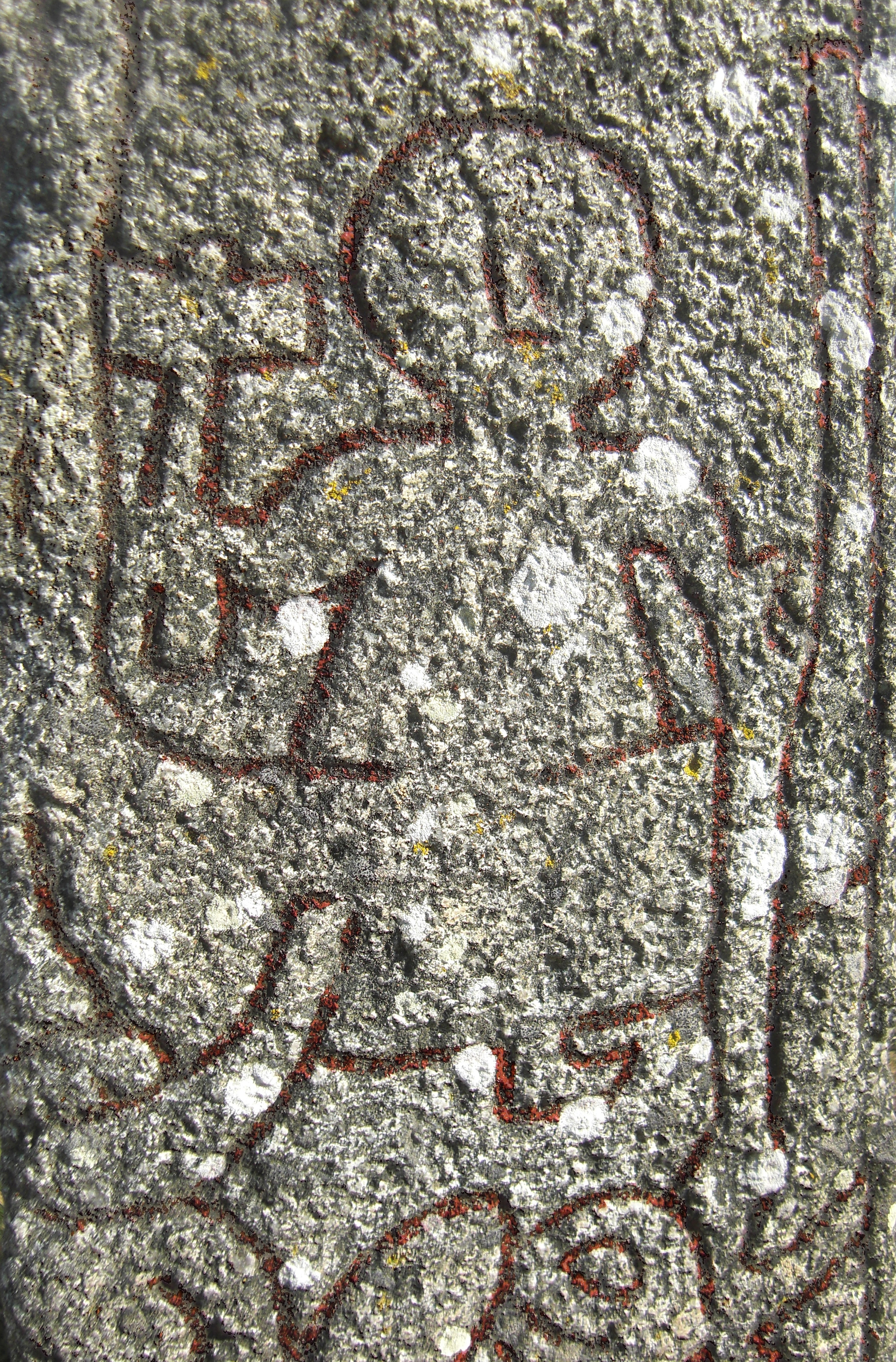 Altunastenen U 1161 (RAÄ-nr Altuna 42:1) vid Altuna kyrka, Altuna socken, Simtuna härad, Fjädrundaland, Enköpings kommun, Uppsala län, Uppland, Sverige. Tors fiskafänge på runstenens vänstra sida visar guden Tor med höjd hammare i en båt med ett oxhuvud på en rev. Observera att Tor trampat igenom botten på båten.